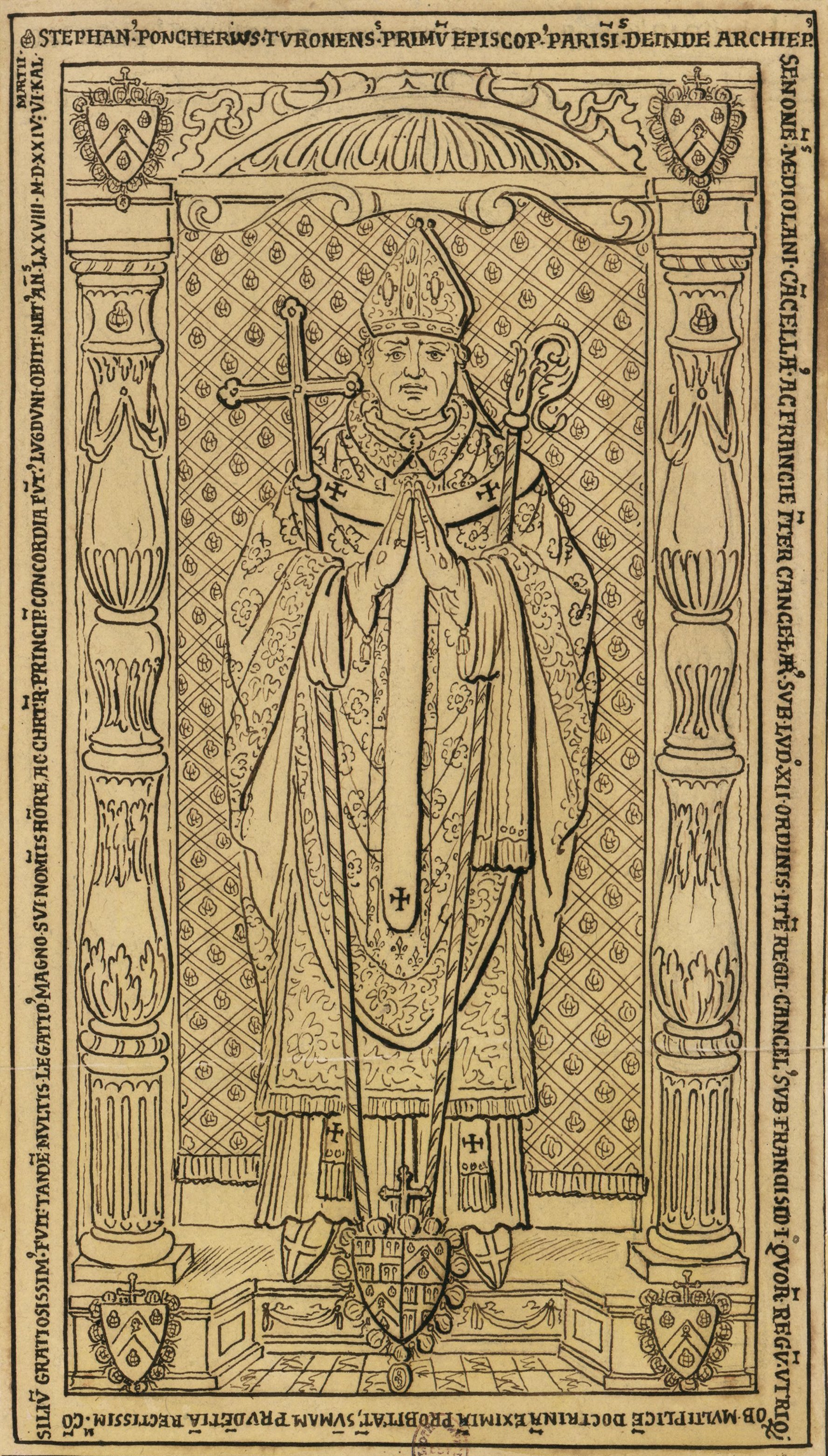 Pierre tombale sur laquelle est gravée l'effigie d'un prélat dans un encadrement d'architecture